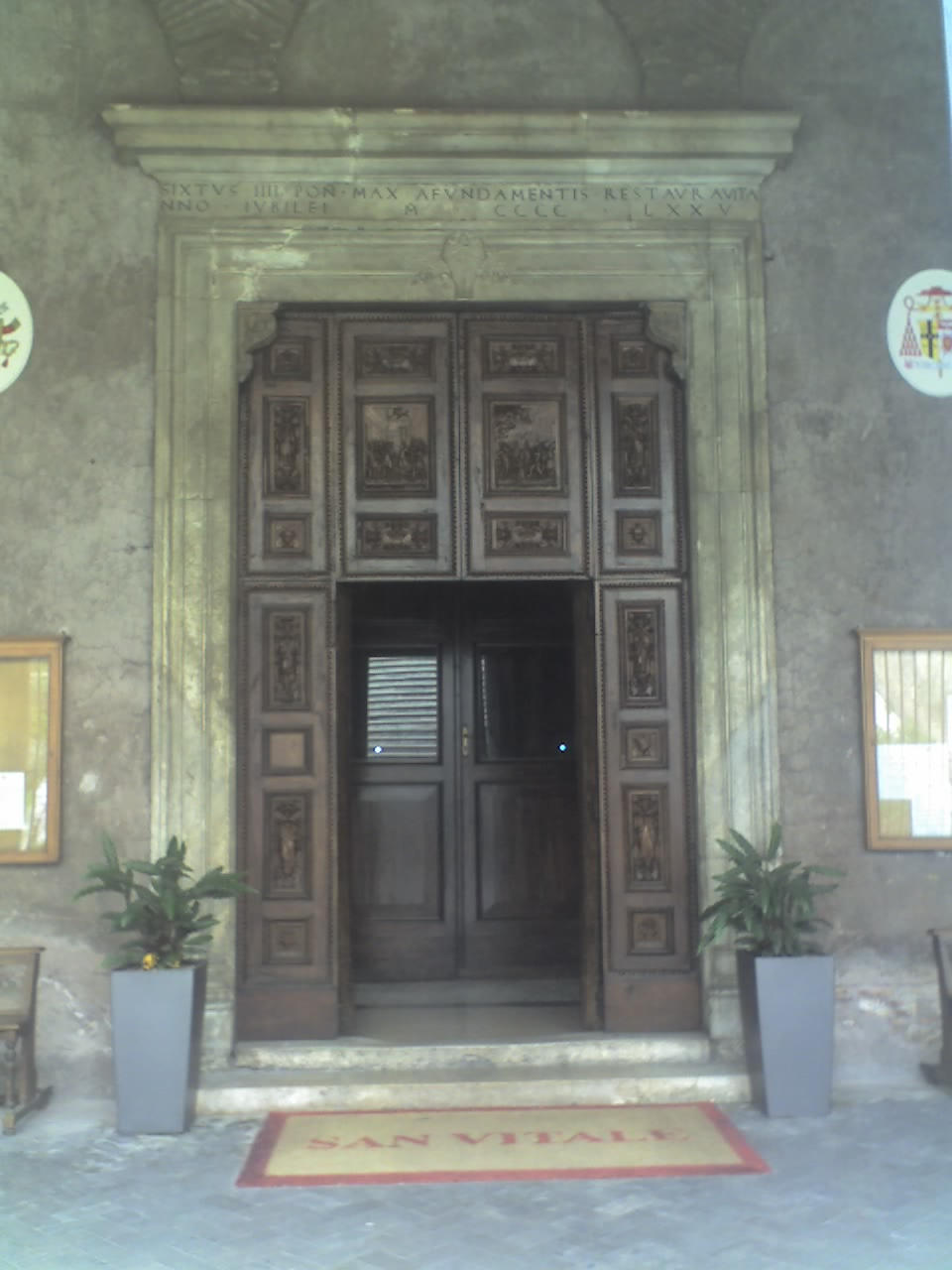 Roma, porta d'accesso alla basilica di San Vitale